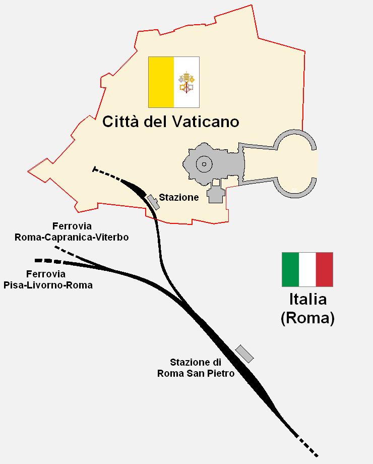 Ferrovia Vaticana